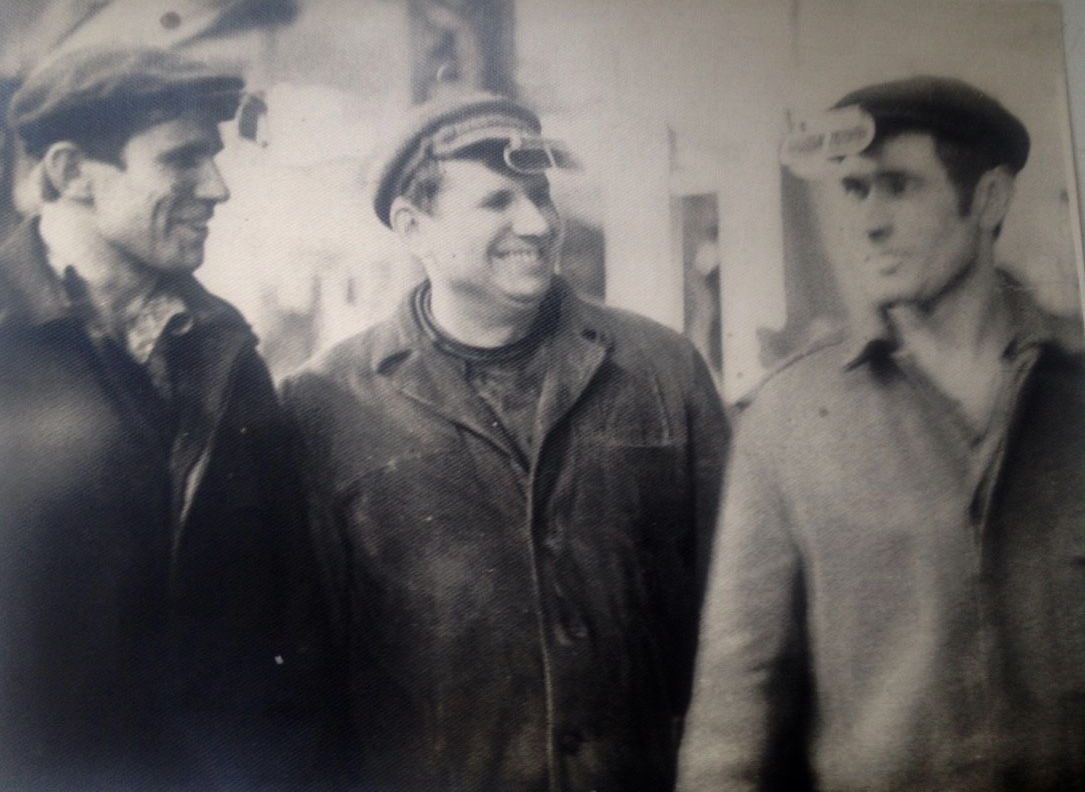 С коллегами по цеху (мартеновский цех Донецкий Металлургический Завод)